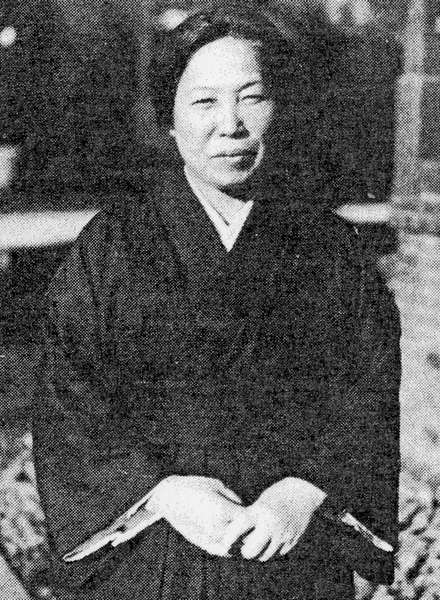 Kiku Makino (Japanese, *1895, †1996)